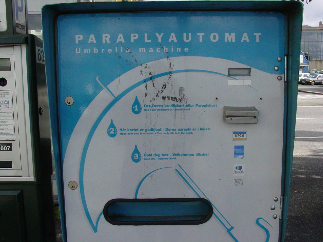 Distributeur de parapluies à Bergen, Norvège. Auteur: Vivien de Walque, photo de voyage. Uploadé par moi même avec son autorisation Saty 7 novembre 2006 à 00:02 (CET)